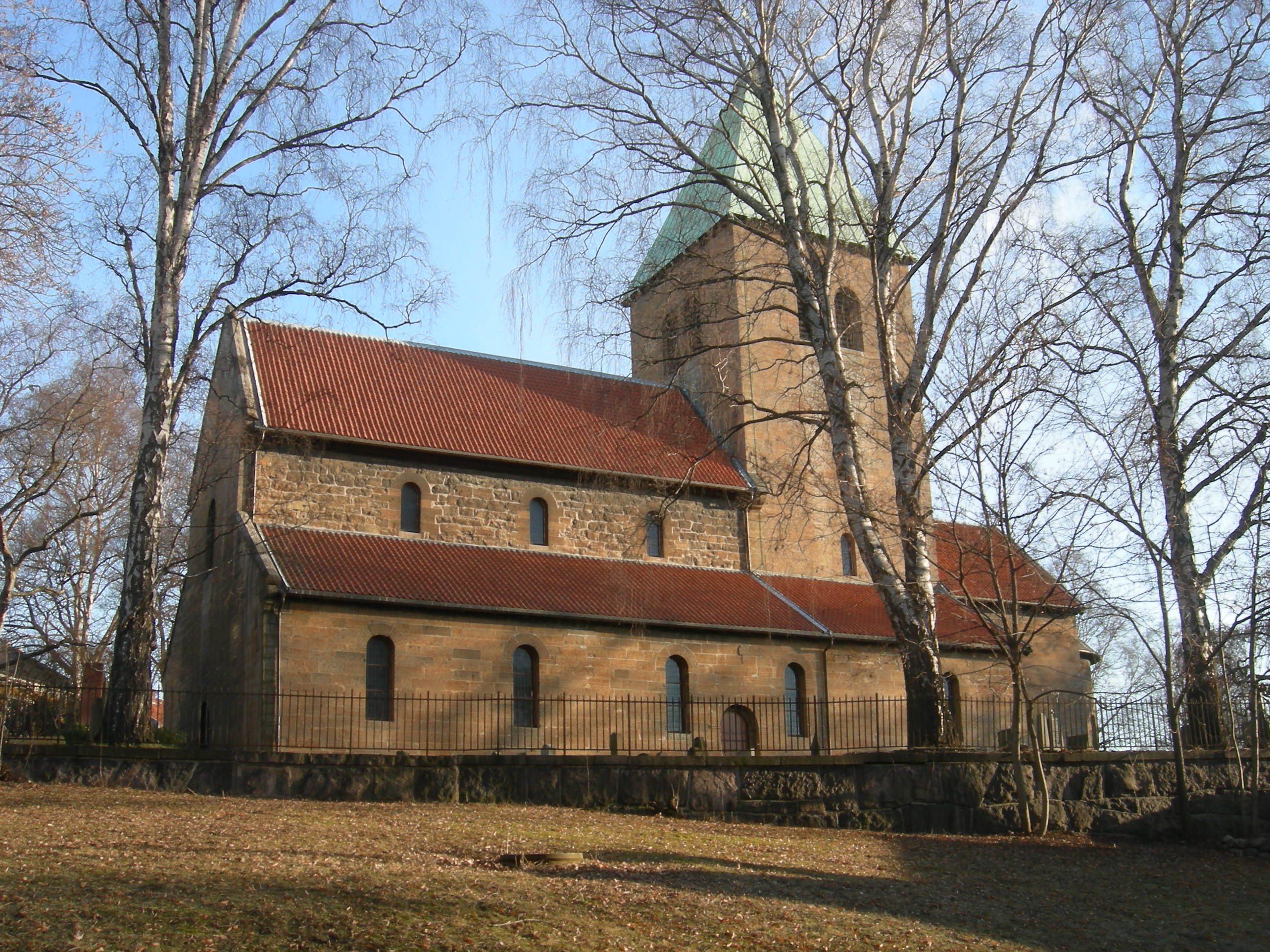 Gamle Aker Church, Oslo, Norway